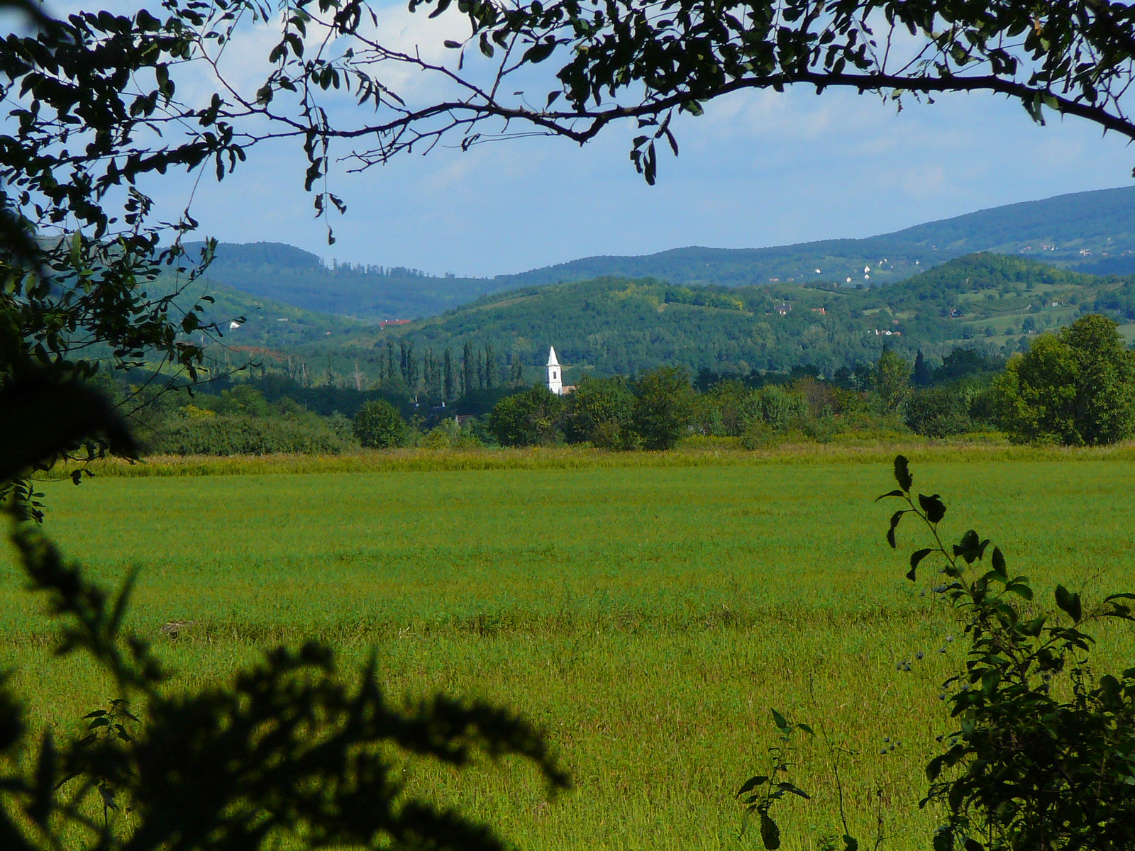 R. k. templom (Salföld, Kossuth u. 2.) This is a photo of a monument in Hungary, Identifier: 10269